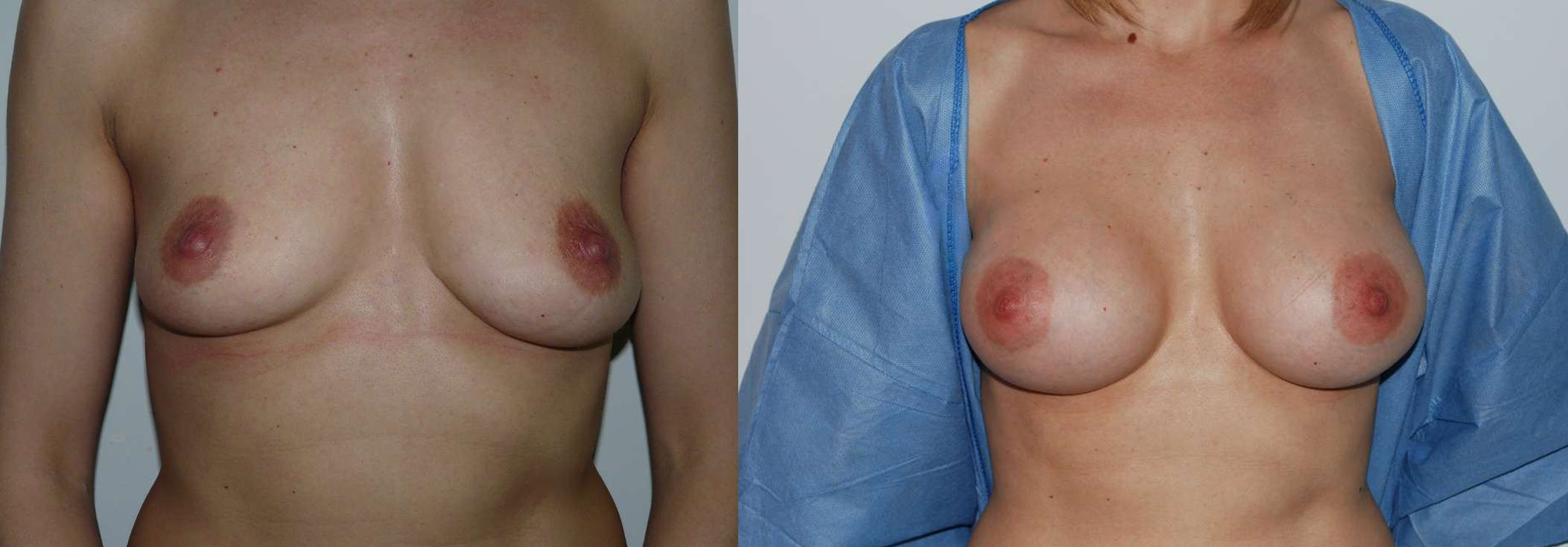 Comparación de unos senos antes y después de una cirugía de aumento con unas prótesis anatómicas.